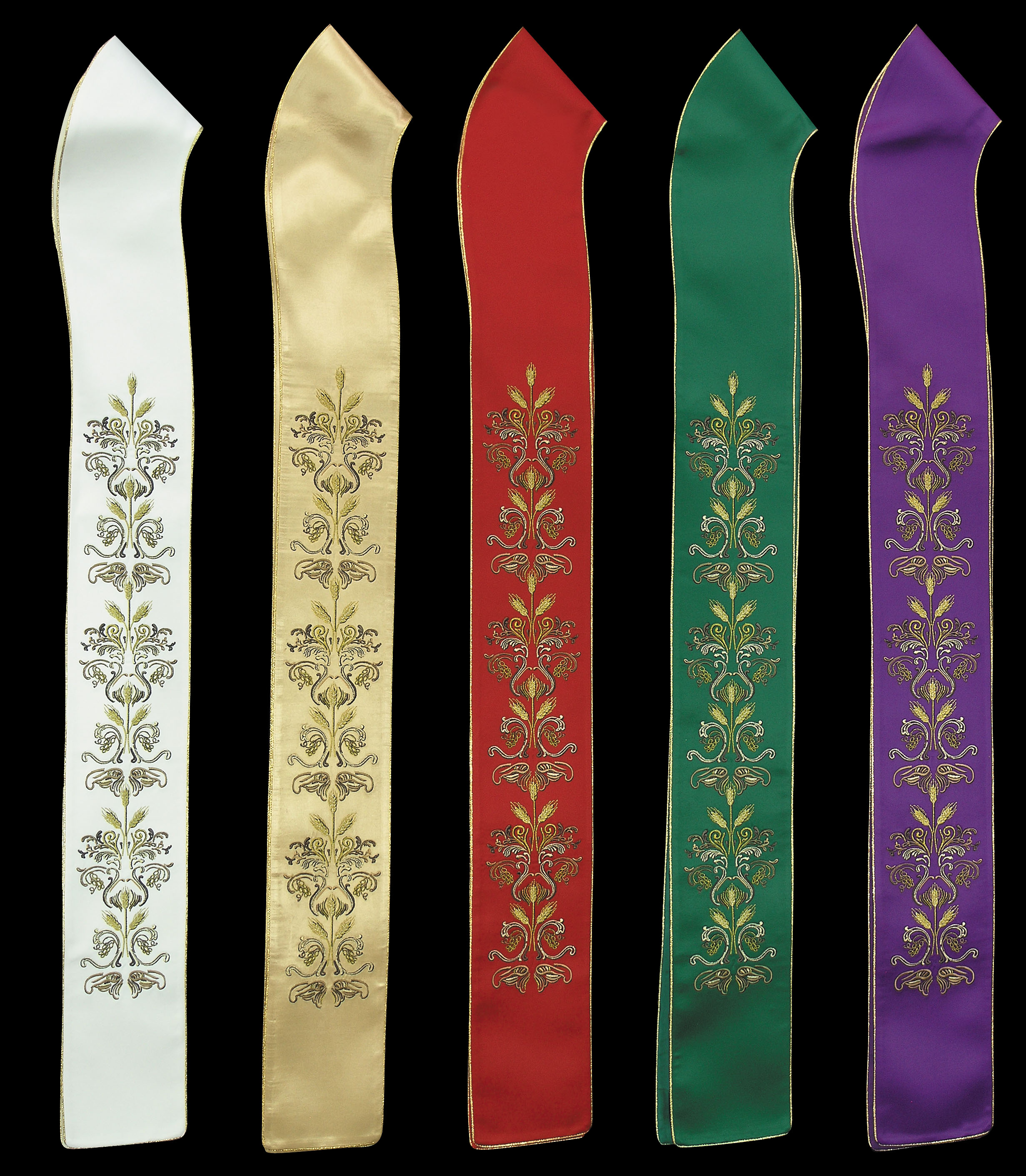 Stuły w Podstawowych Kolorach Liturgicznym